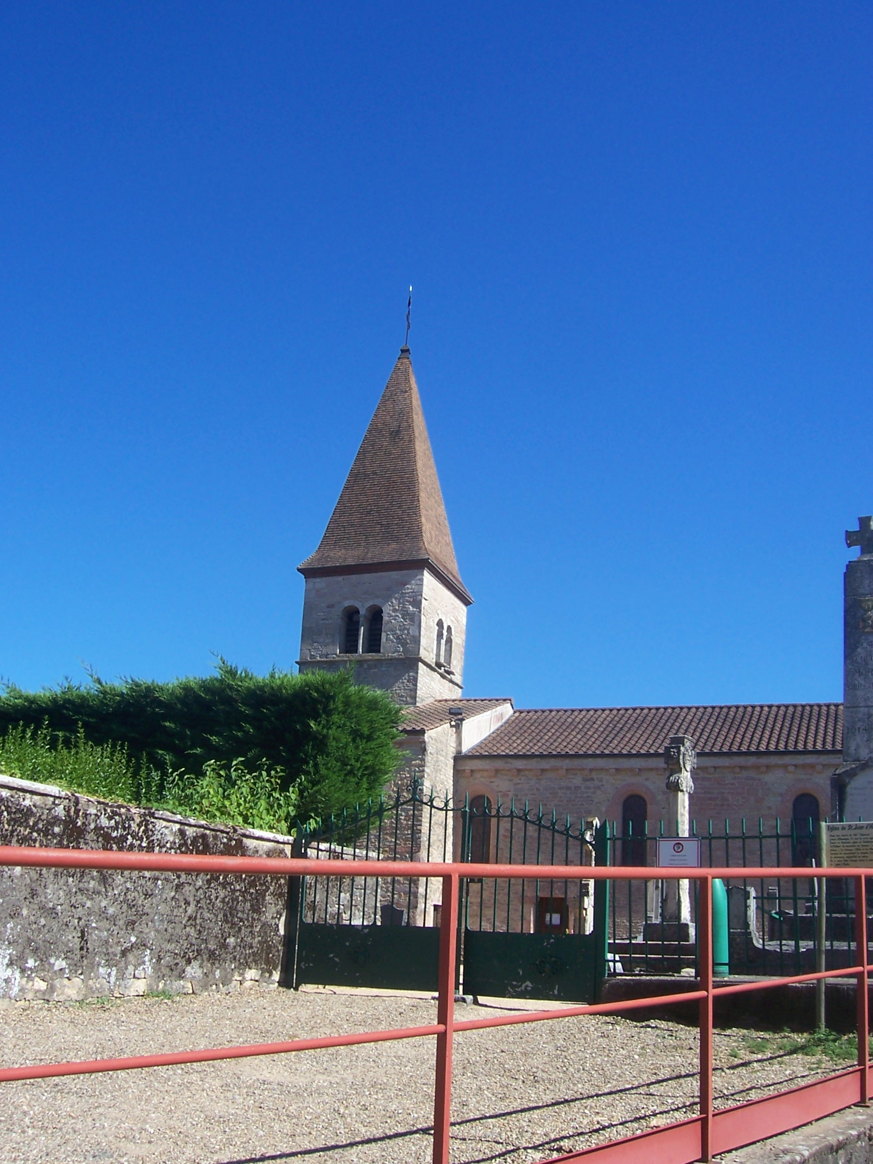 Eglise d'Huilly-sur-Seille